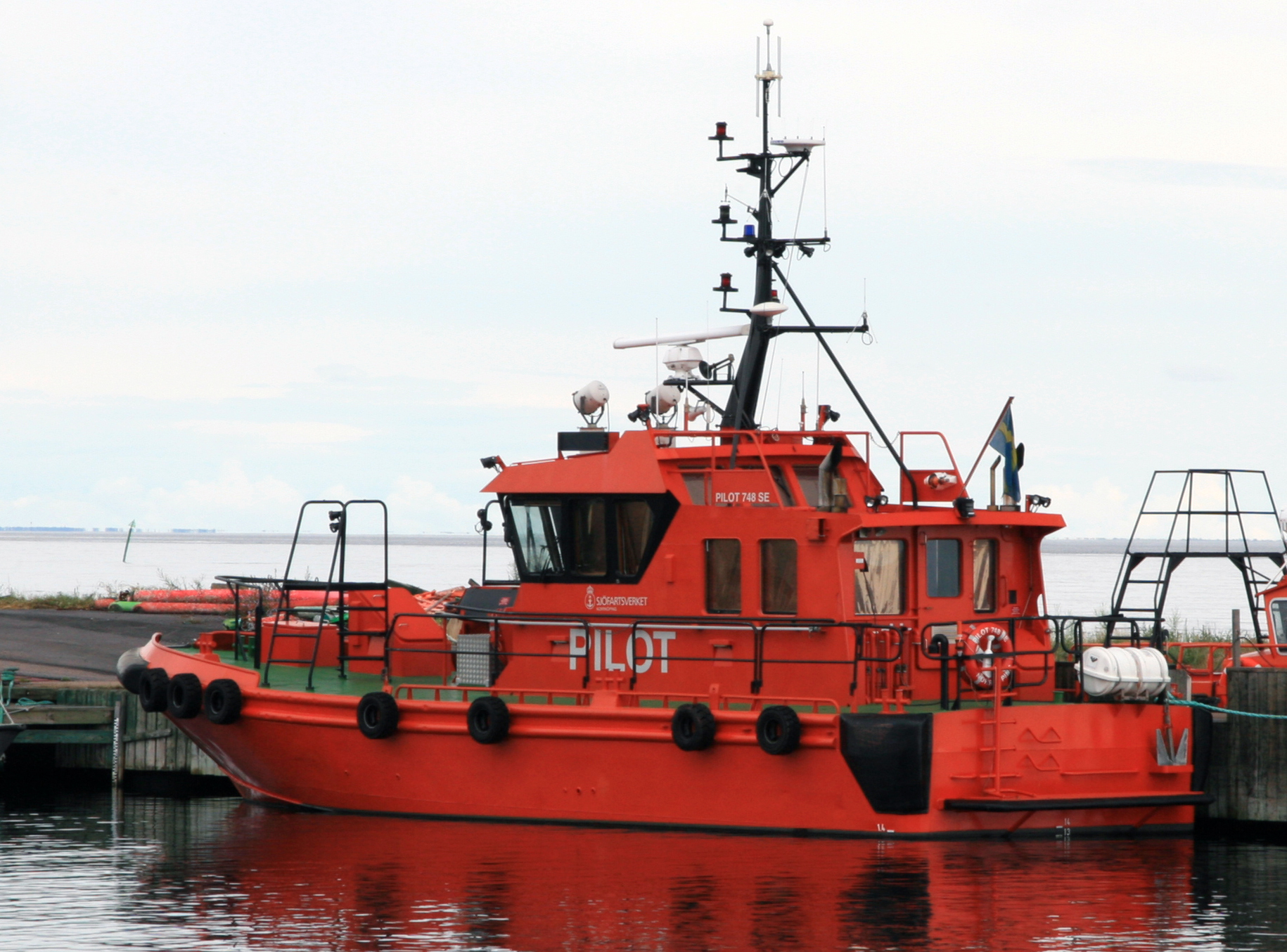 Pilot 748 SE i Oskarshamn 20 juli 2008